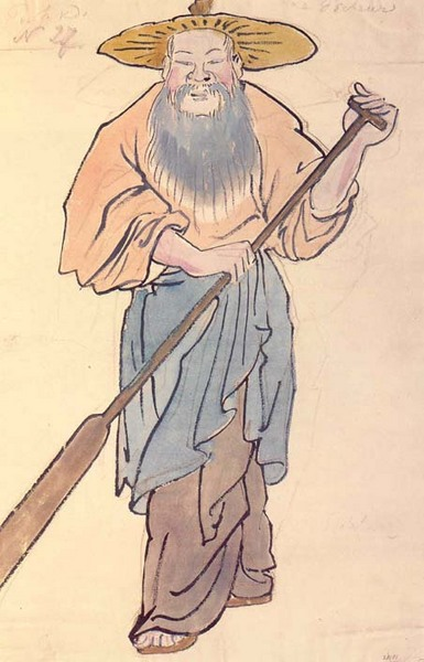 Эскиз костюма рыбака к «Соловью» И.Стравинского. 1914